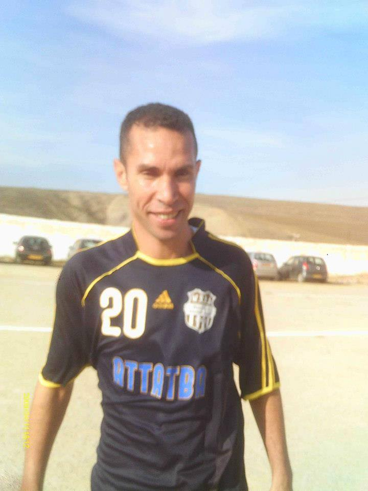 Ishak Ali Moussa